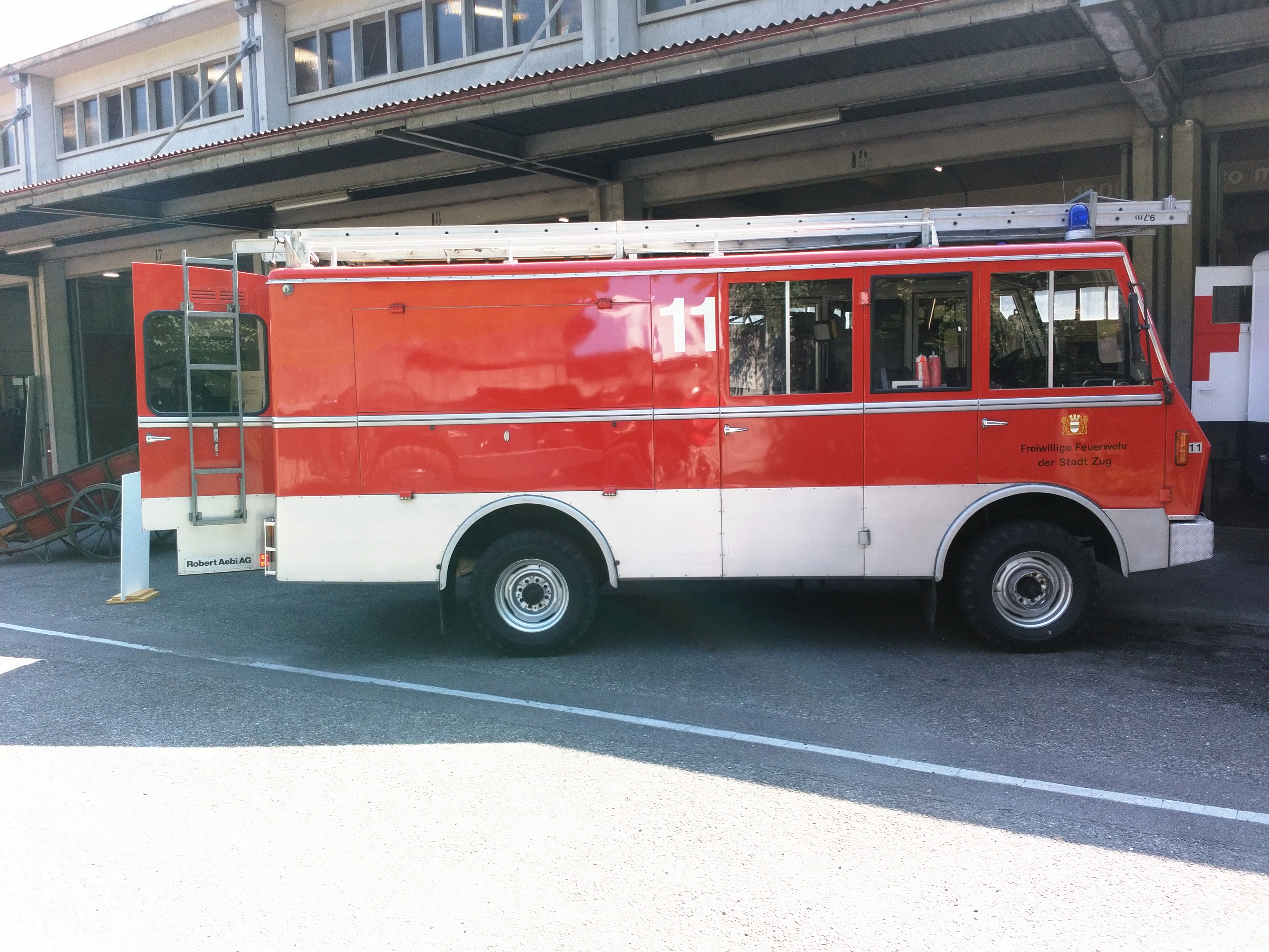 Geser 4x4 F-250 Seite